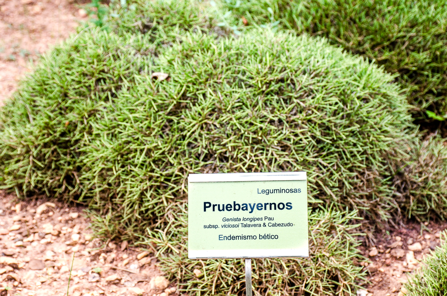 Genista longipes subsp. viciosoi (Pruebayernos). Endemismo bético. Jardín botánico Torre del Vinagre. Jaén.